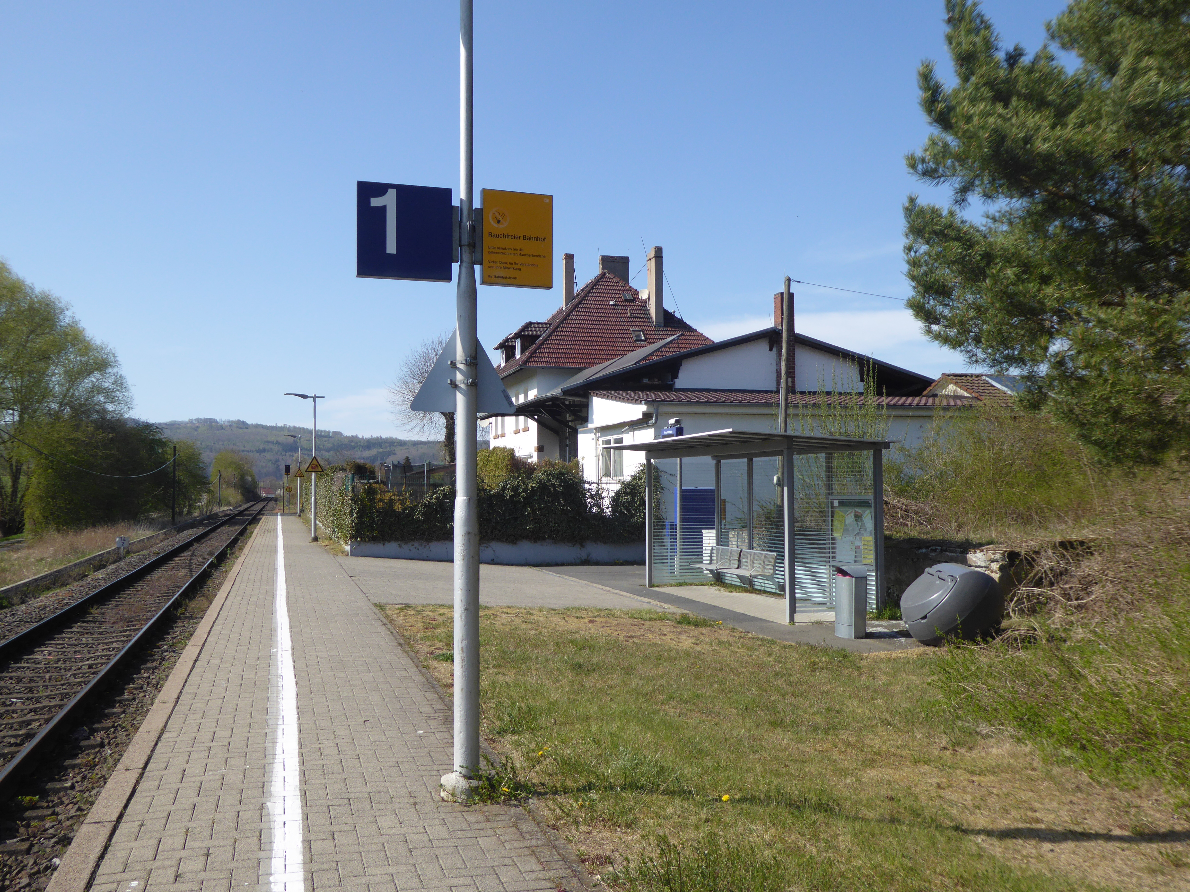 Der heutige Haltepunkt (ehemaliger Bahnhof) in Lödingsen. Er liegt genau zwischen den Adelebser Ortsteilen Lödingsen und Erbsen, weil er ursprünglich beide bedienen sollte.